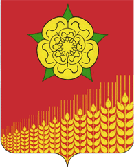 село Красное Кущевского района Краснодарского края